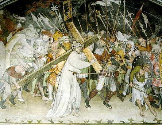 Giacomo Jacquerio, Ascending to Calvary, fresco, 1410 ca., Abbazia di Sant'Antonio di Ranverso, Buttigliera Alta, (Province of Turin)